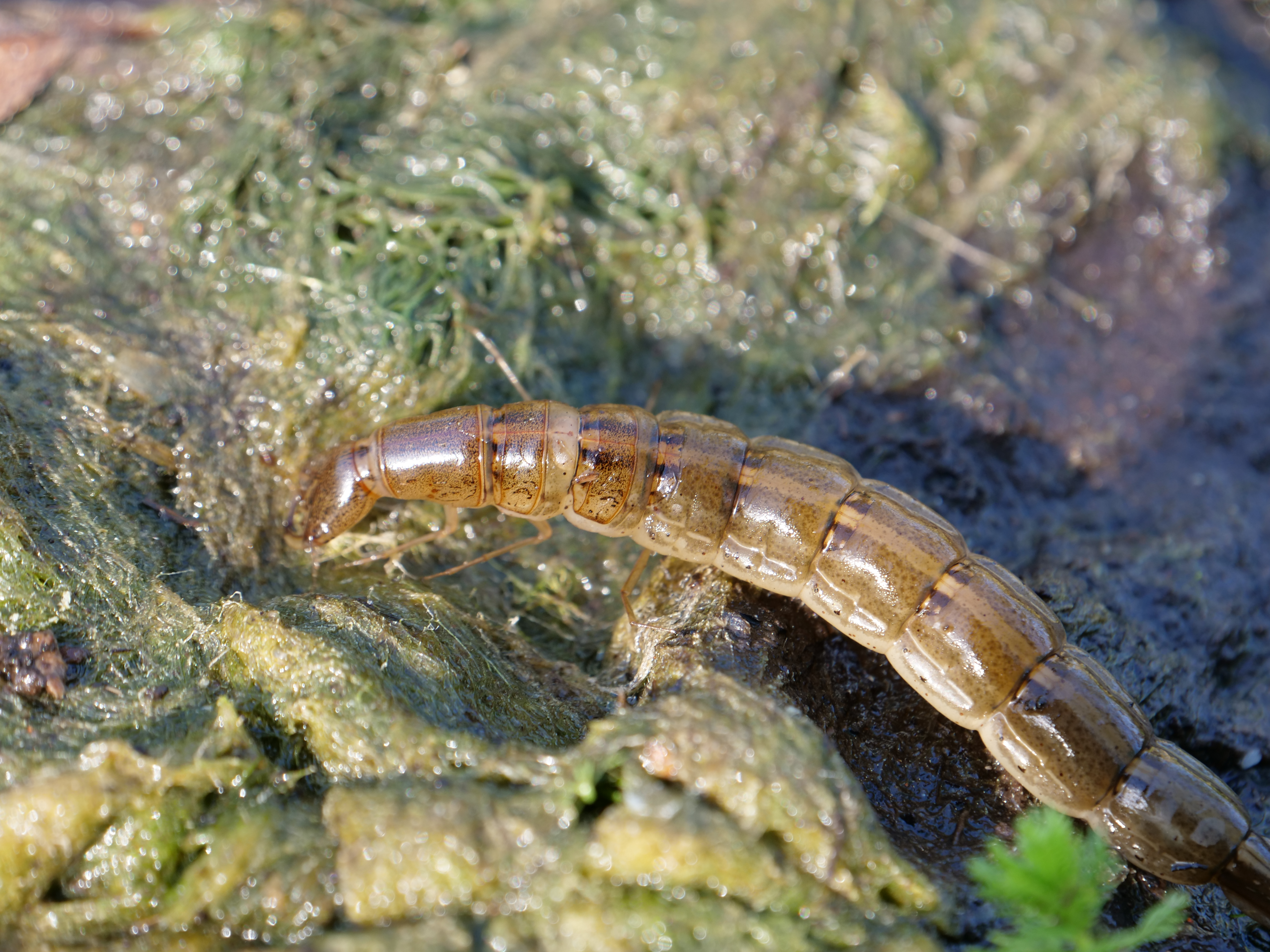 Larve eines Gelbrandkäfers im Teufelsbruch(Berlin-Hakenfelde).